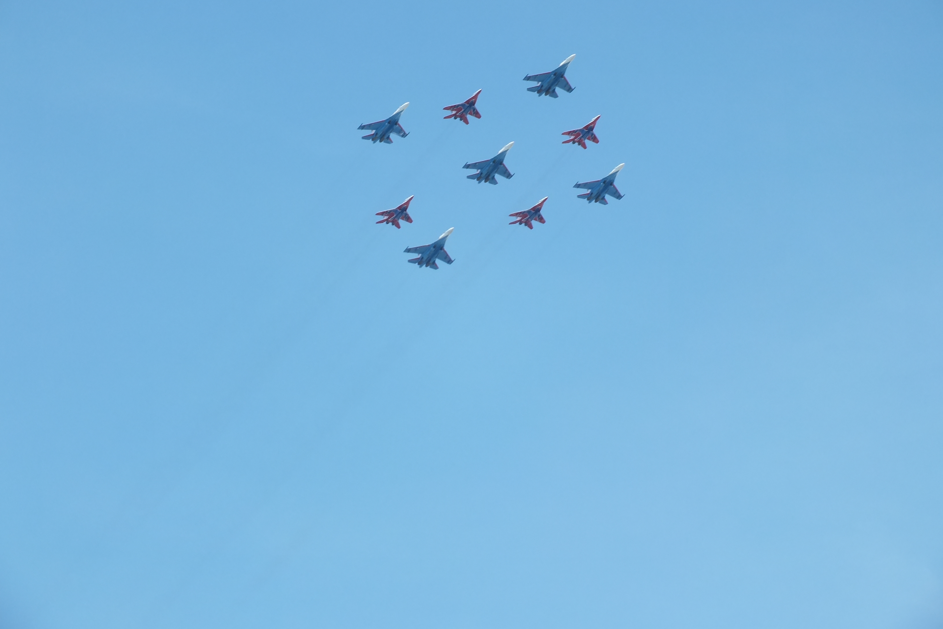 Полёт самолётов над московским районом Братеево в ходе подготовки 7 мая к Параду Победы.